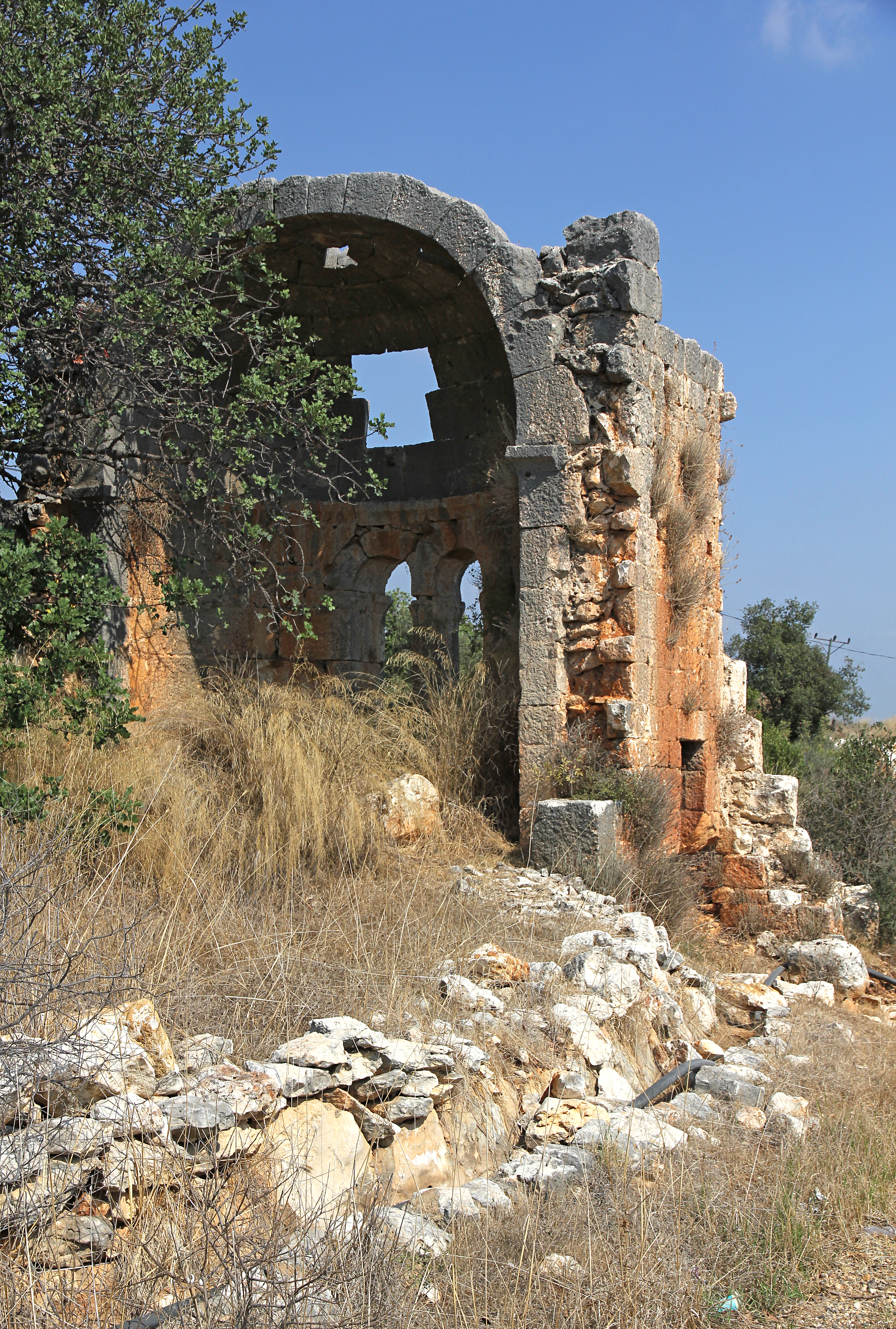 Ruine der byzantinischen Kirche von Batısandal nahe Erdemli, Südtürkei, Apsis von Süden